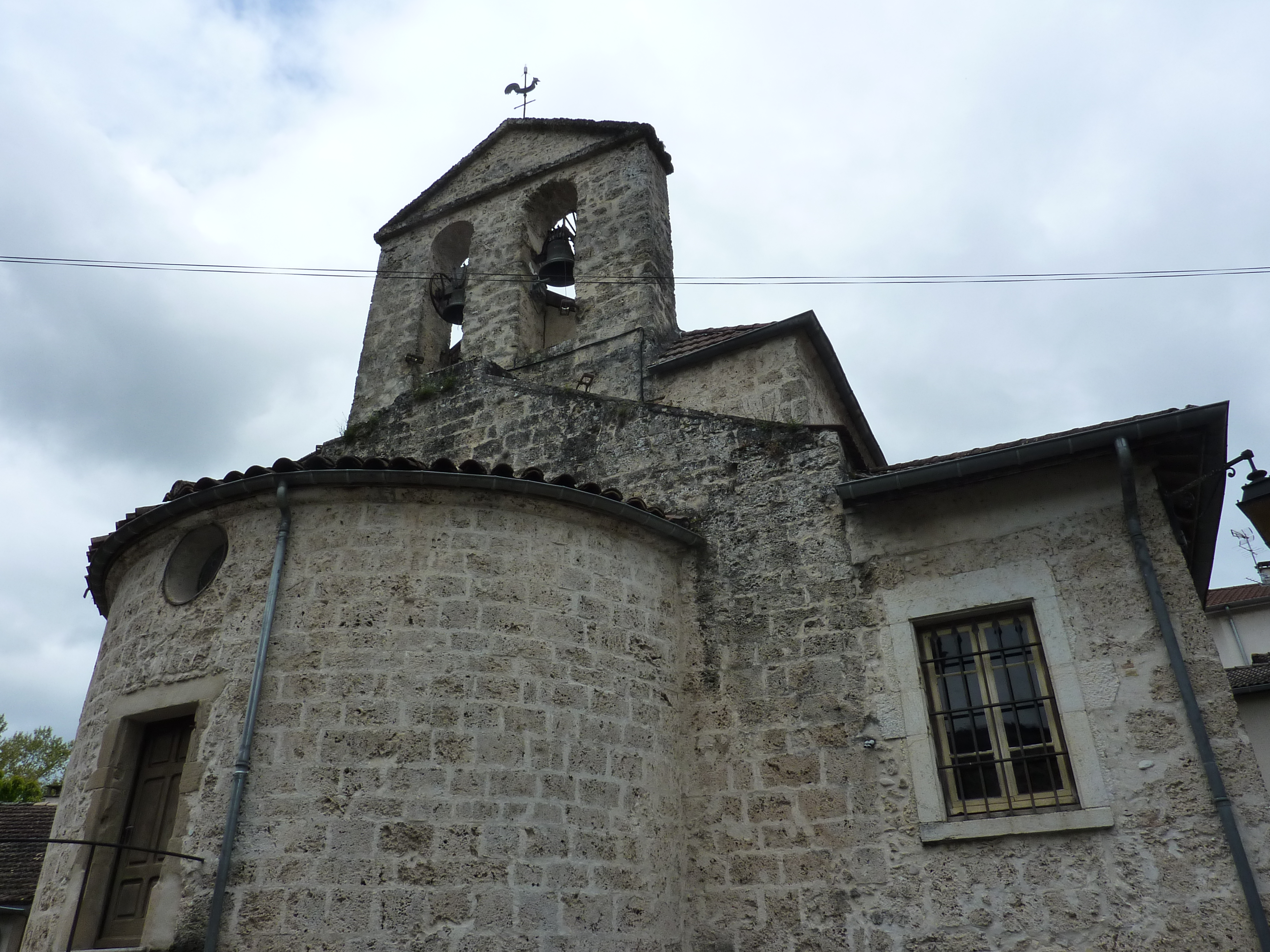 Clocher de l'église d'Auberives-en-Royans, Isère, France